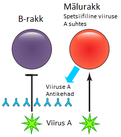 Kirjeldab lühidalt antigeenide tekkemehanismi.